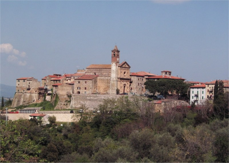 Caldana, Centro Storico